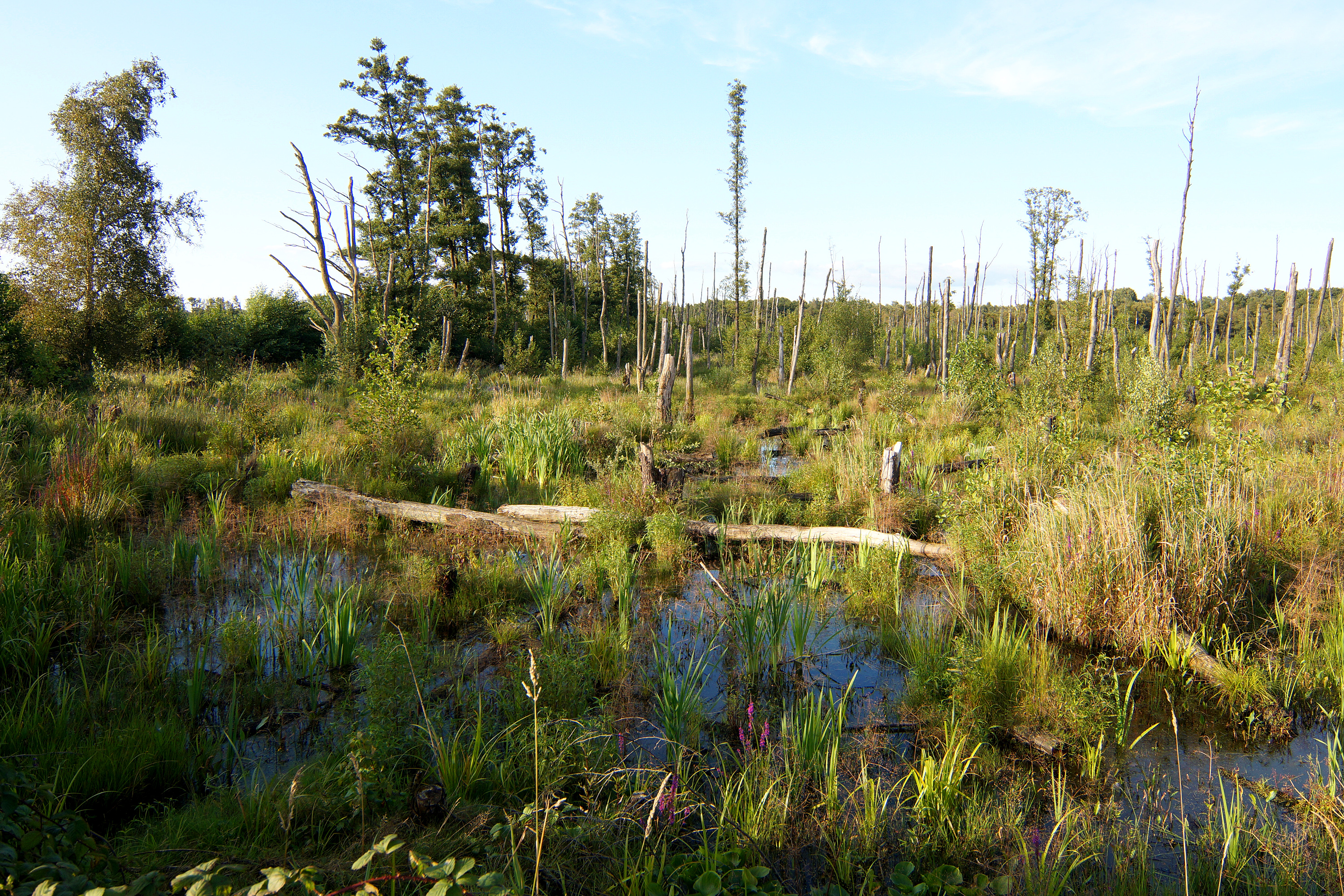 Naturschutzgebiet „Lahrer Moor“ in Haselünne, Landkreis Emsland, Niedersachsen